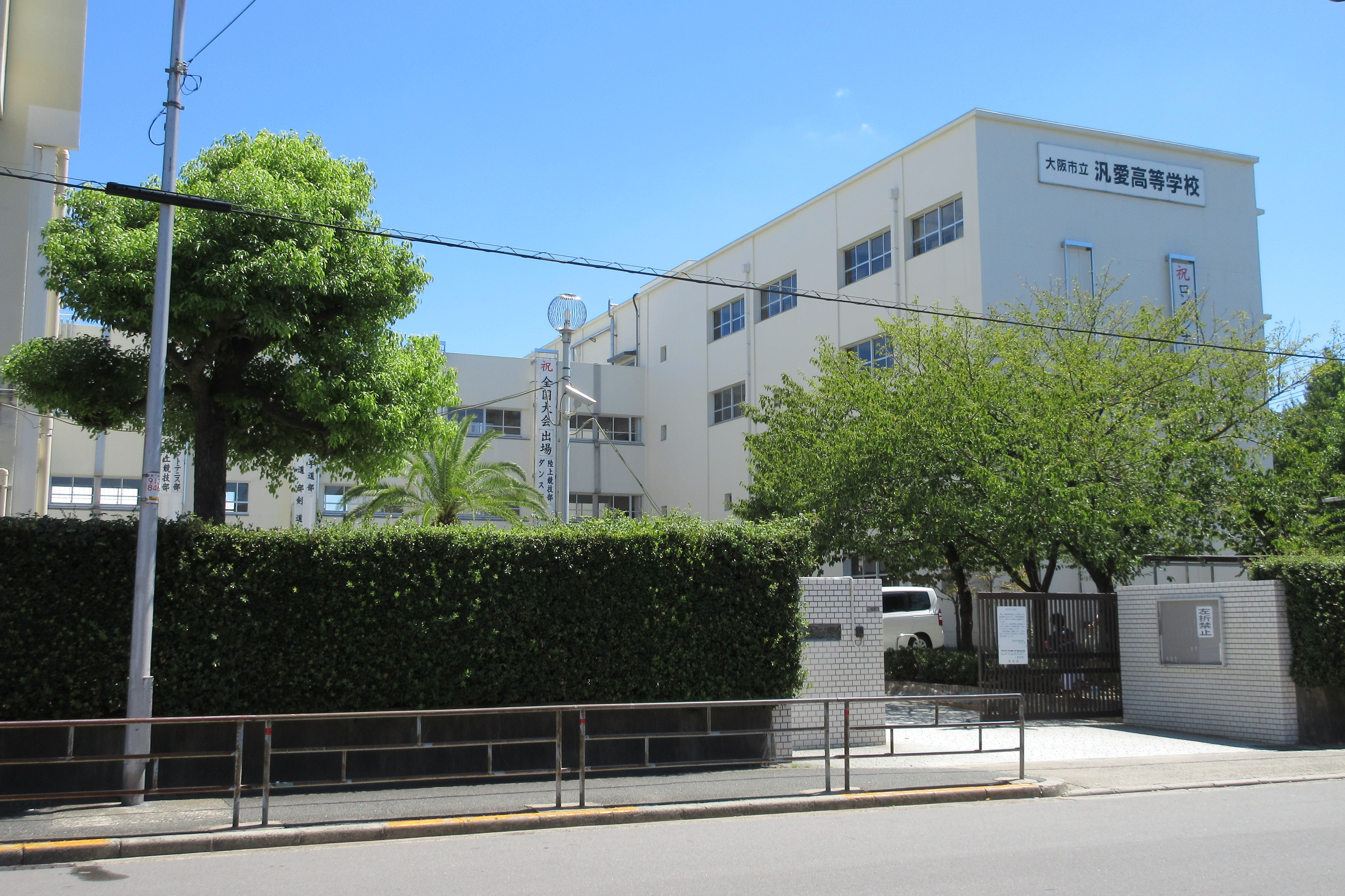 大阪市立汎愛高等学校